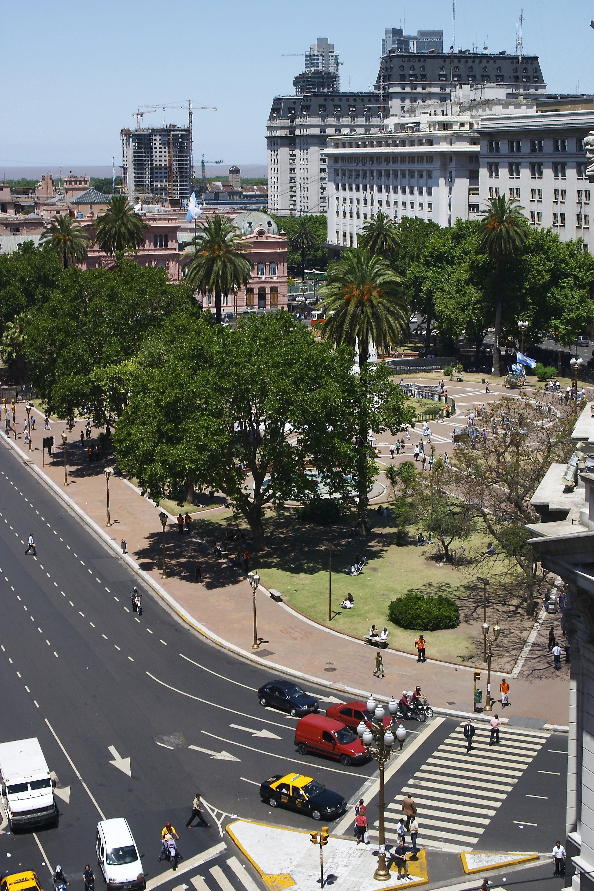 Vista de la Plaza de Mayo, Buenos Aires, Argentina. La foto fue tomada desde el 7º piso del Edificio Sudamérica, sito en Diagonal norte y Rivadavia. El edificio rosado es la casa de gobierno, mas a la derecha puede verse el edificio Libertador, sede del comando de las fuerzas armadas de la nacion y un poco mas a la derecha el edificio del ministerio de economia donde funciona tambien la administracion federal de ingresos publicos.